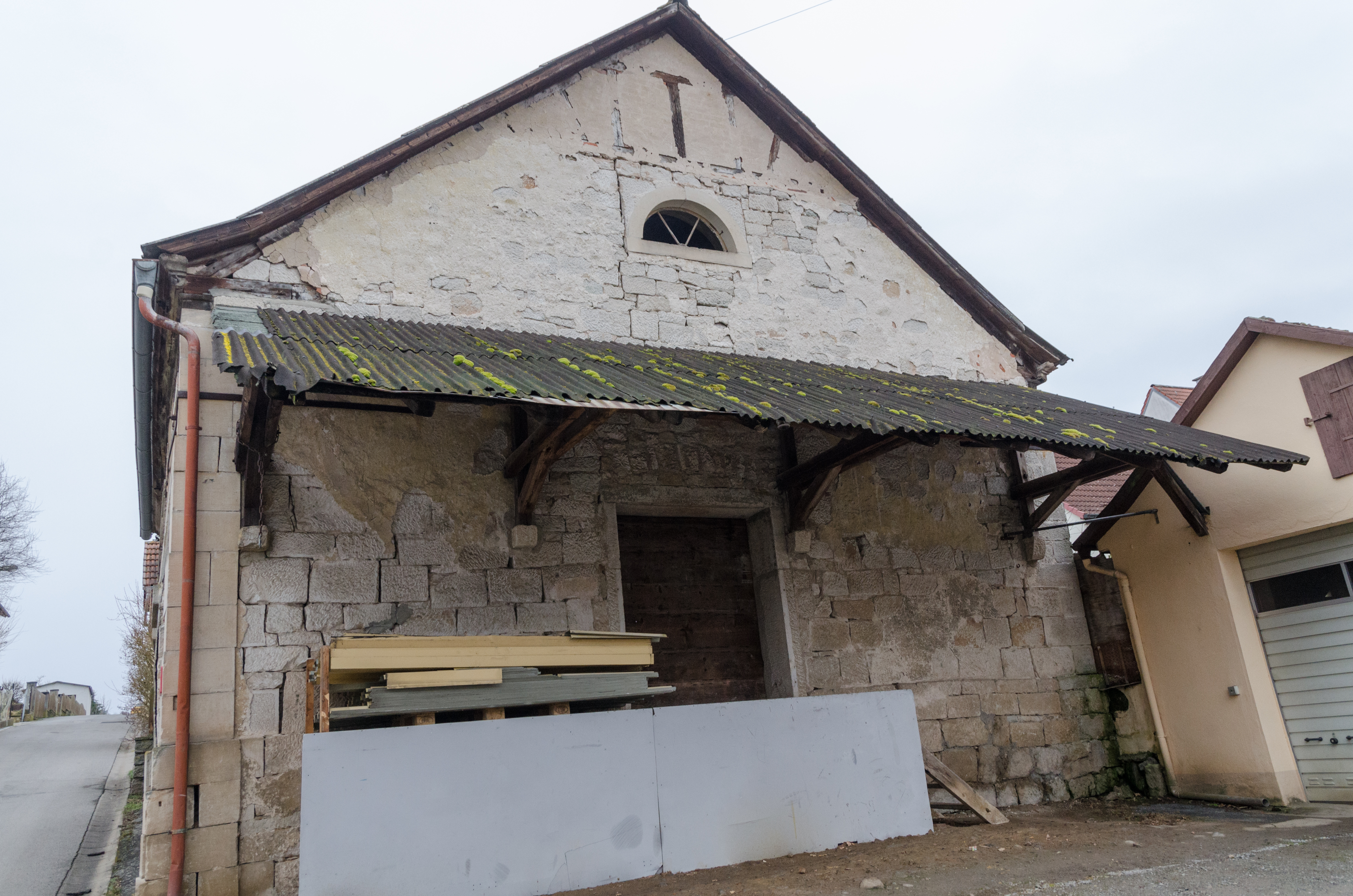 Großeibstadt, Kleineibstadt, Wegkreuz, An der Barget, Ehem. Synagoge